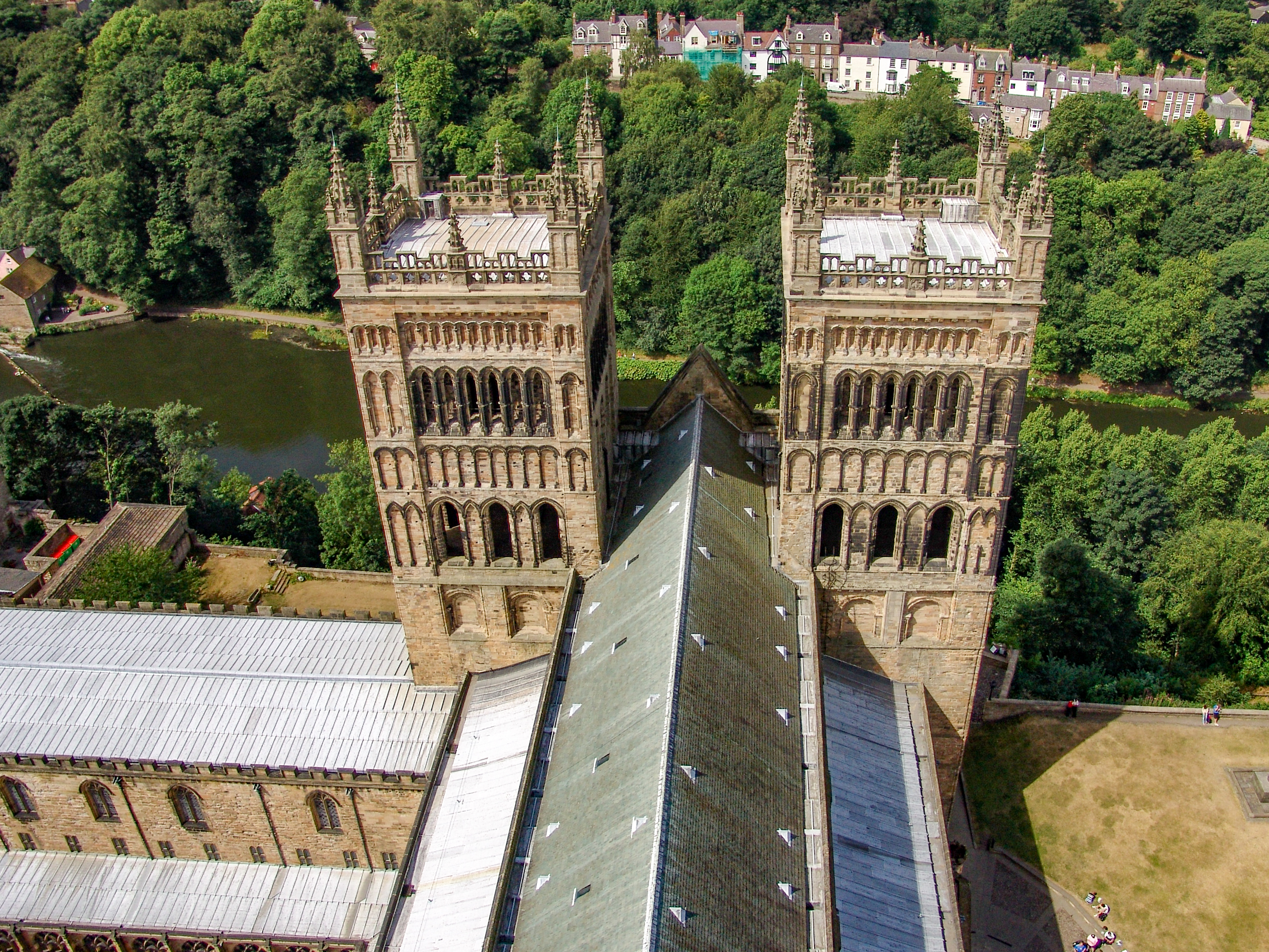 Durham Cathedral